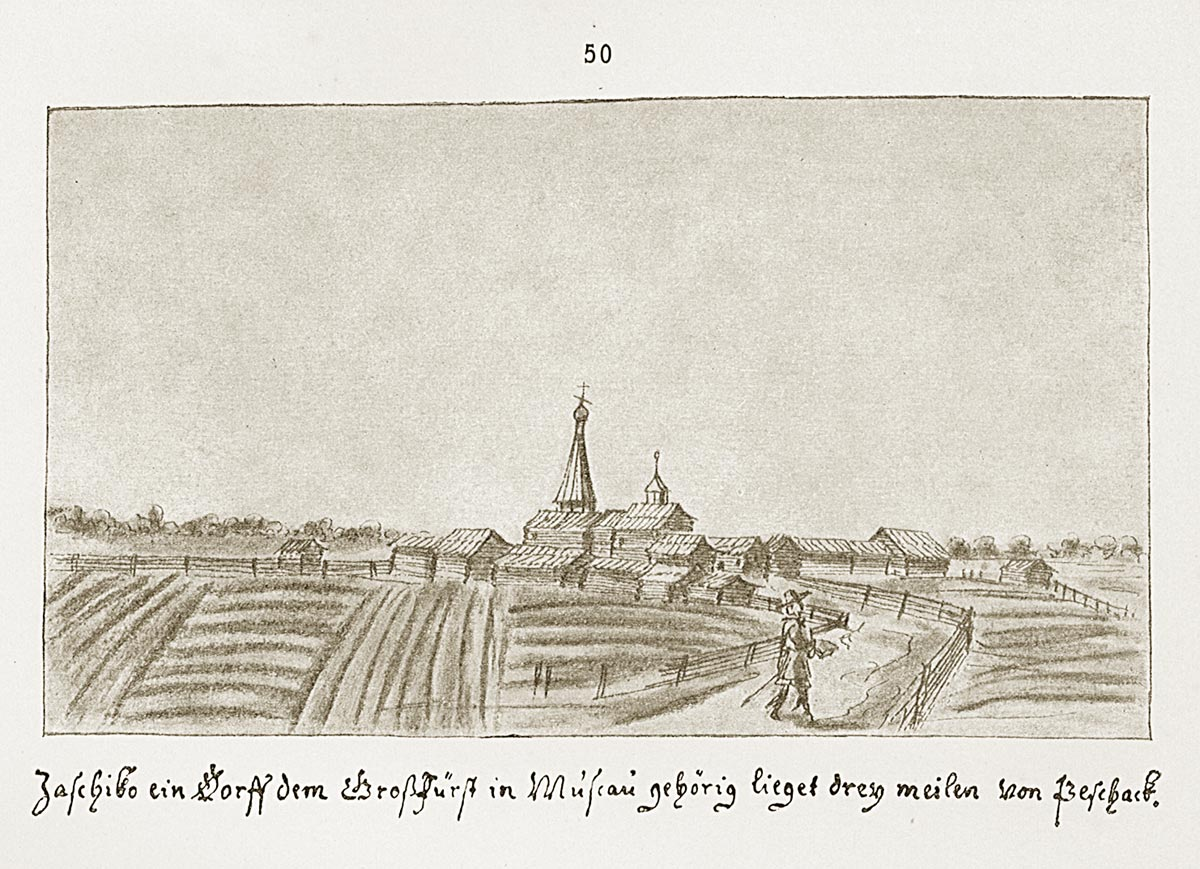 Чашниково